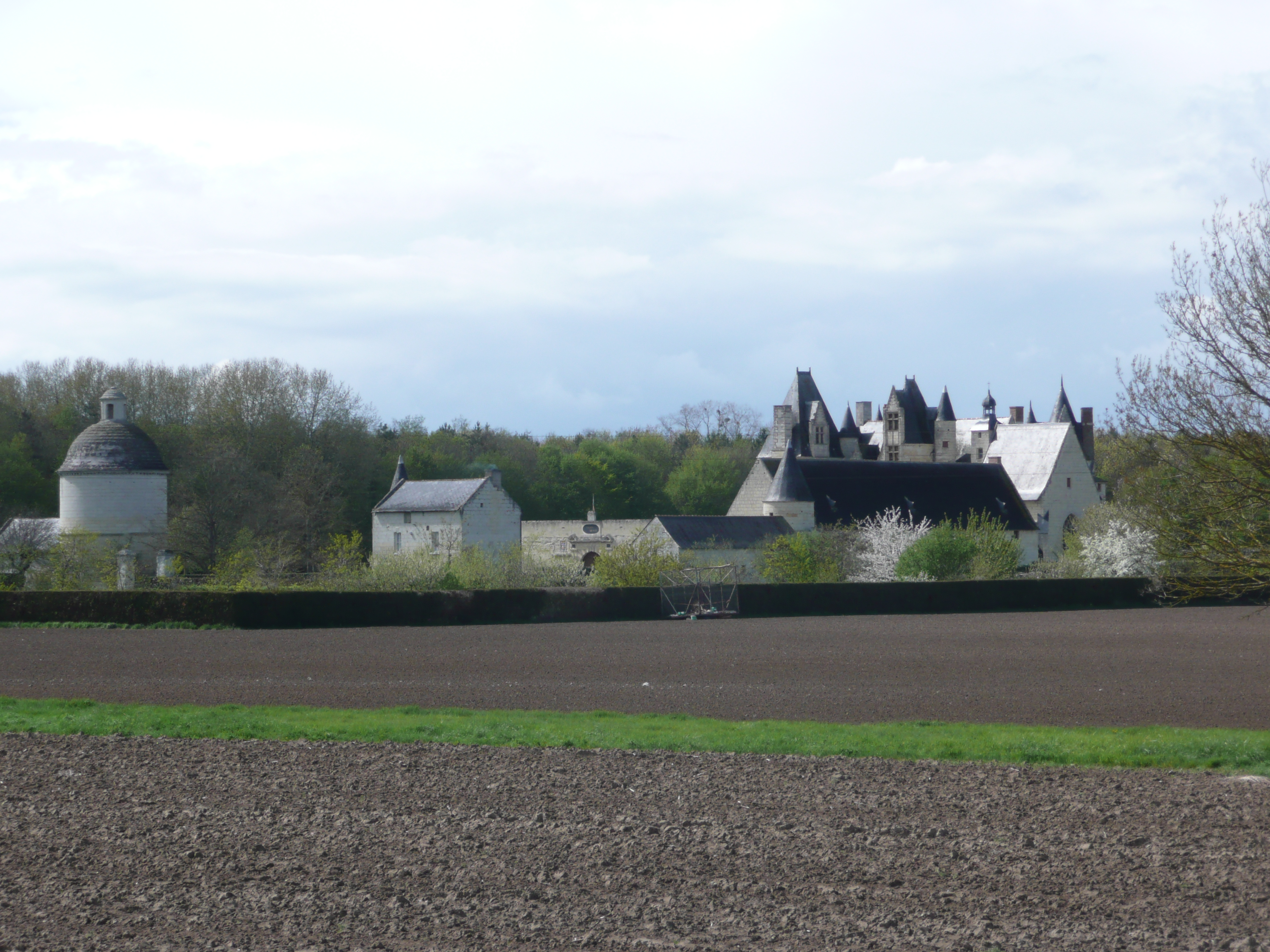 Chateau de Boumois